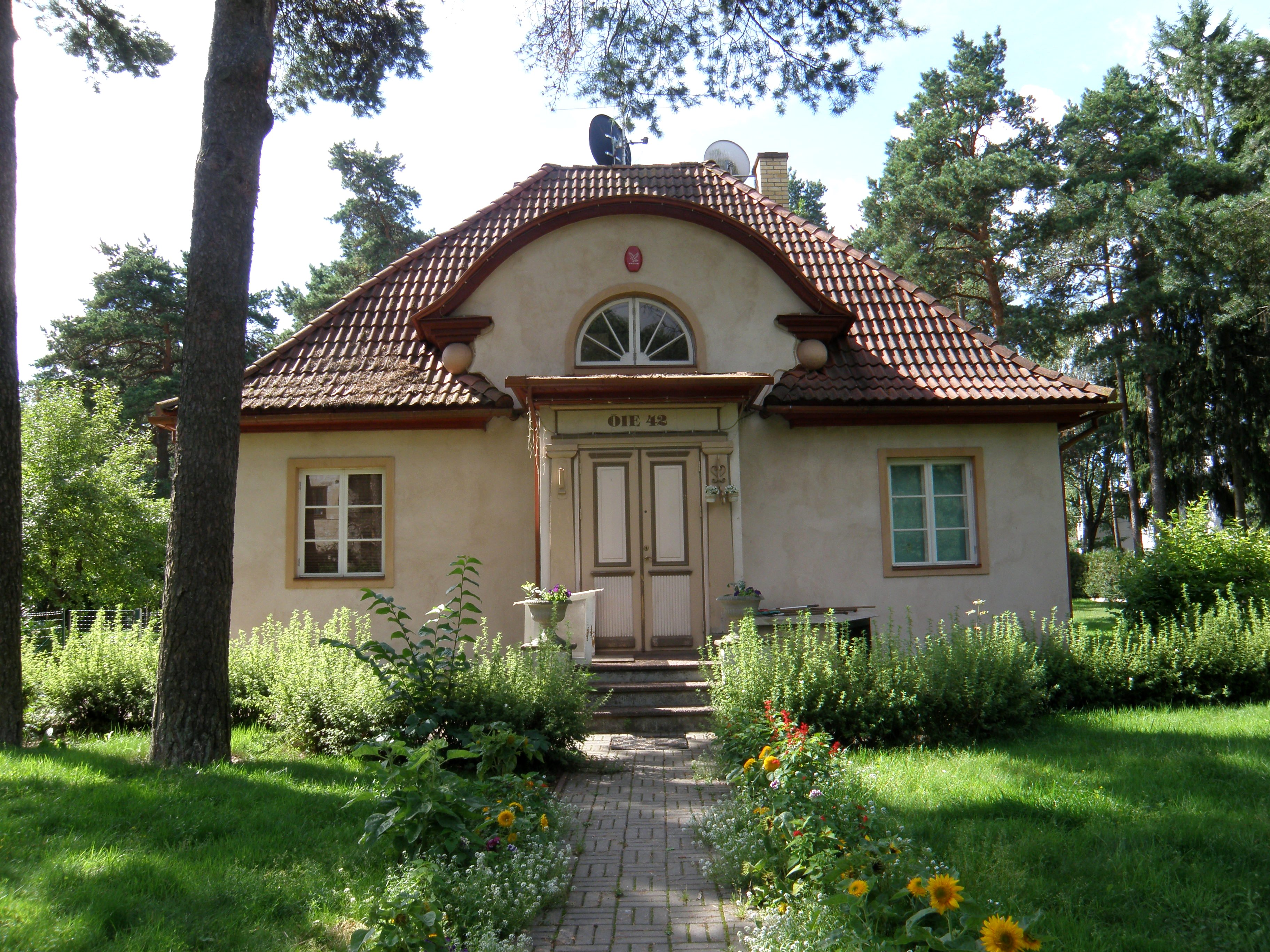 Elamu Õie 42